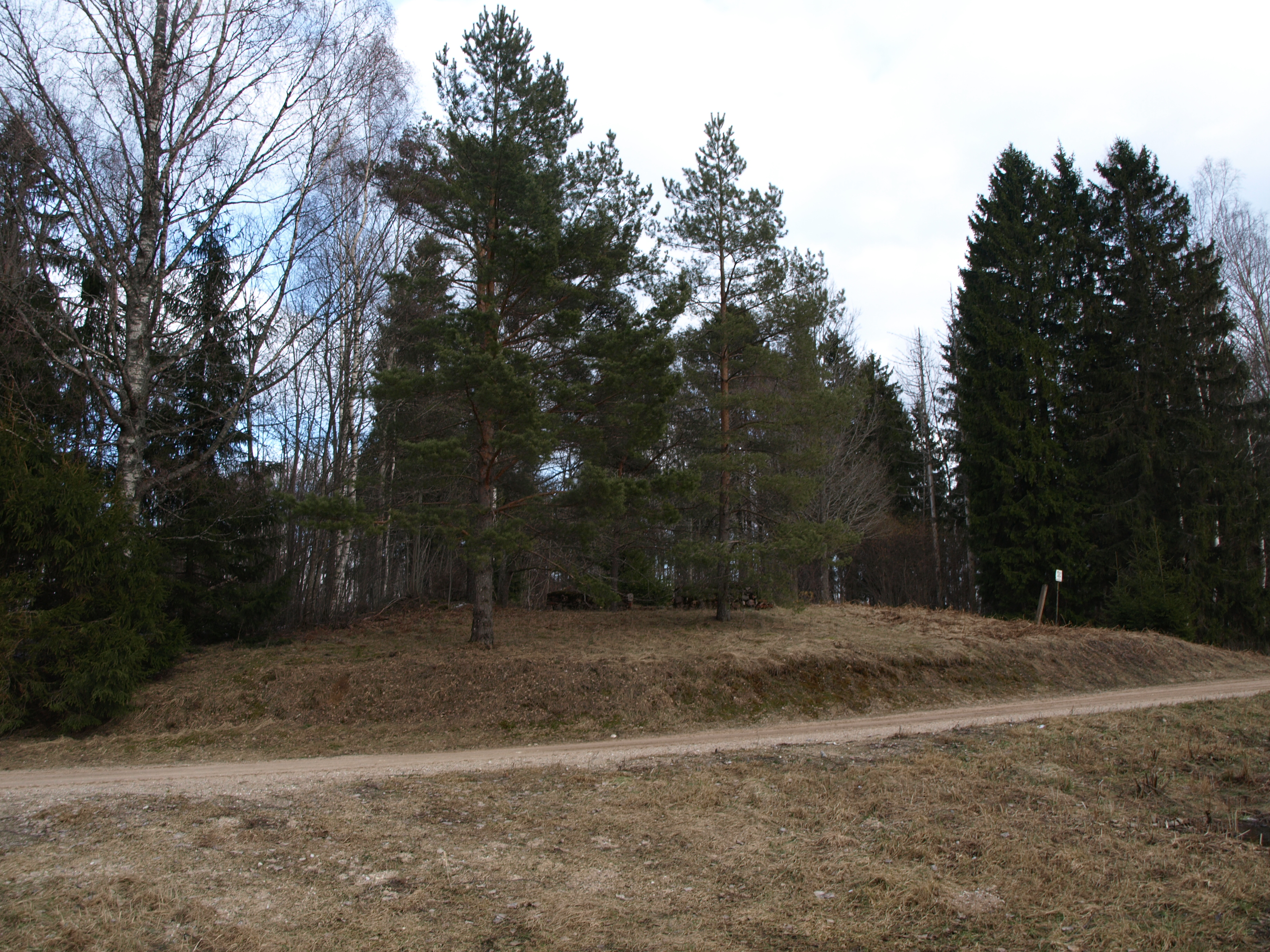 Risti kabeli varemed